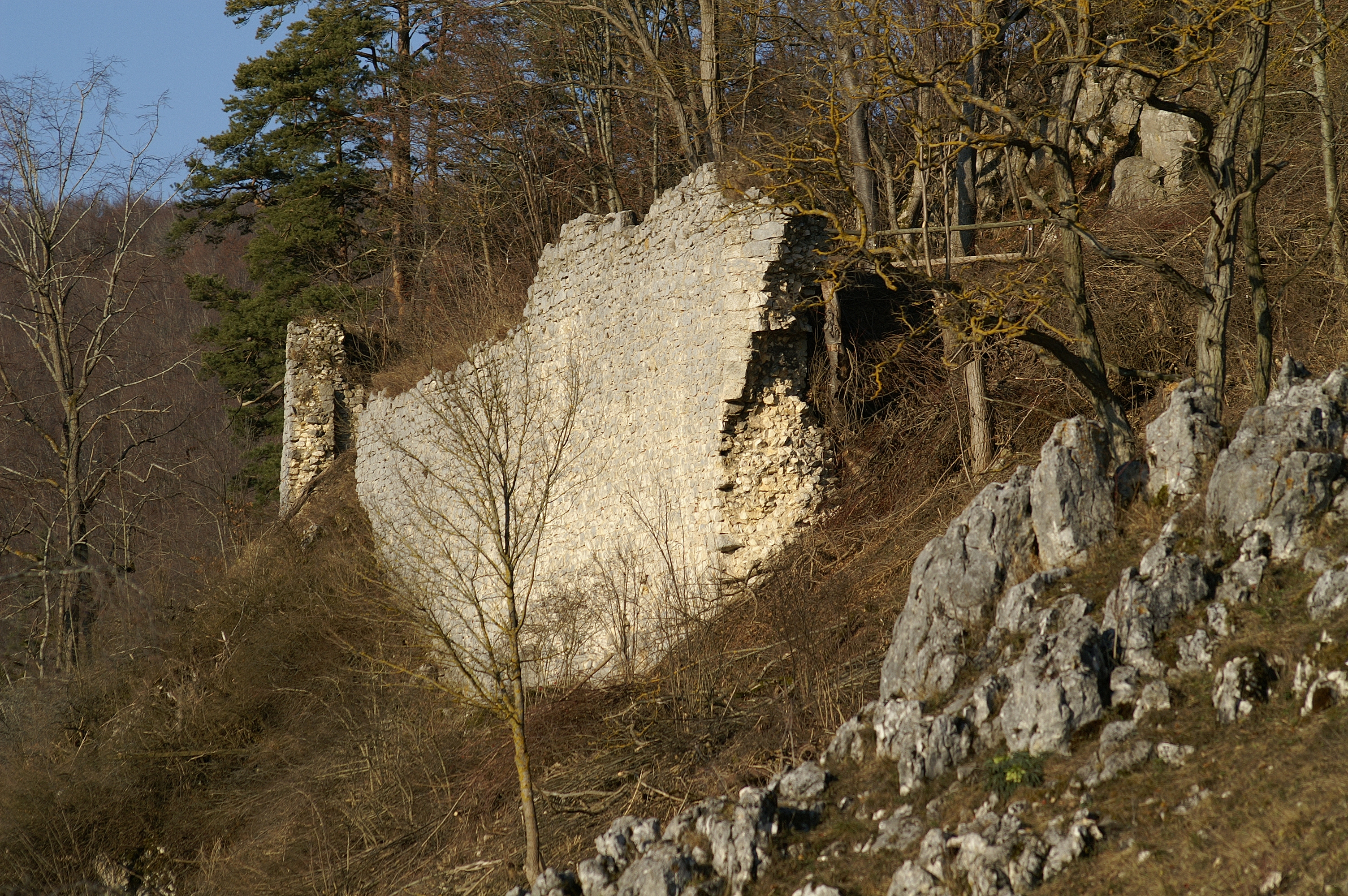 Von der Burg Hohenschelklingen sind außer dem Bergfried nur noch Mauerreste vorhanden